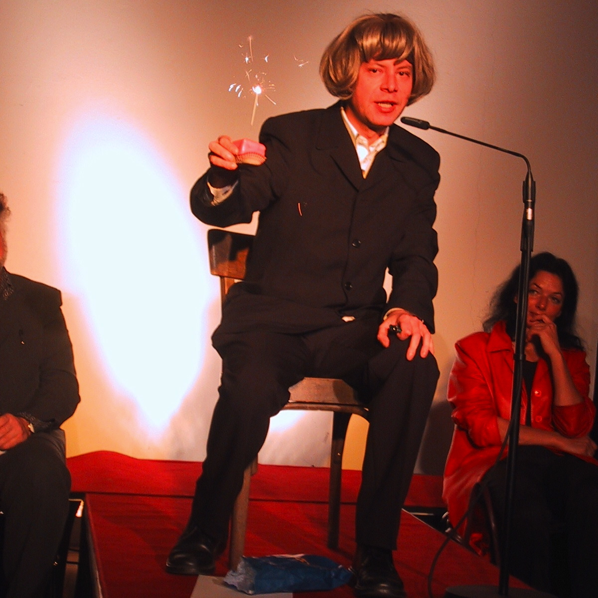 Der Auftritt Martin G. Wankos (mit Perücke) bei der GAV Revue im Literaturhaus Graz (2003)